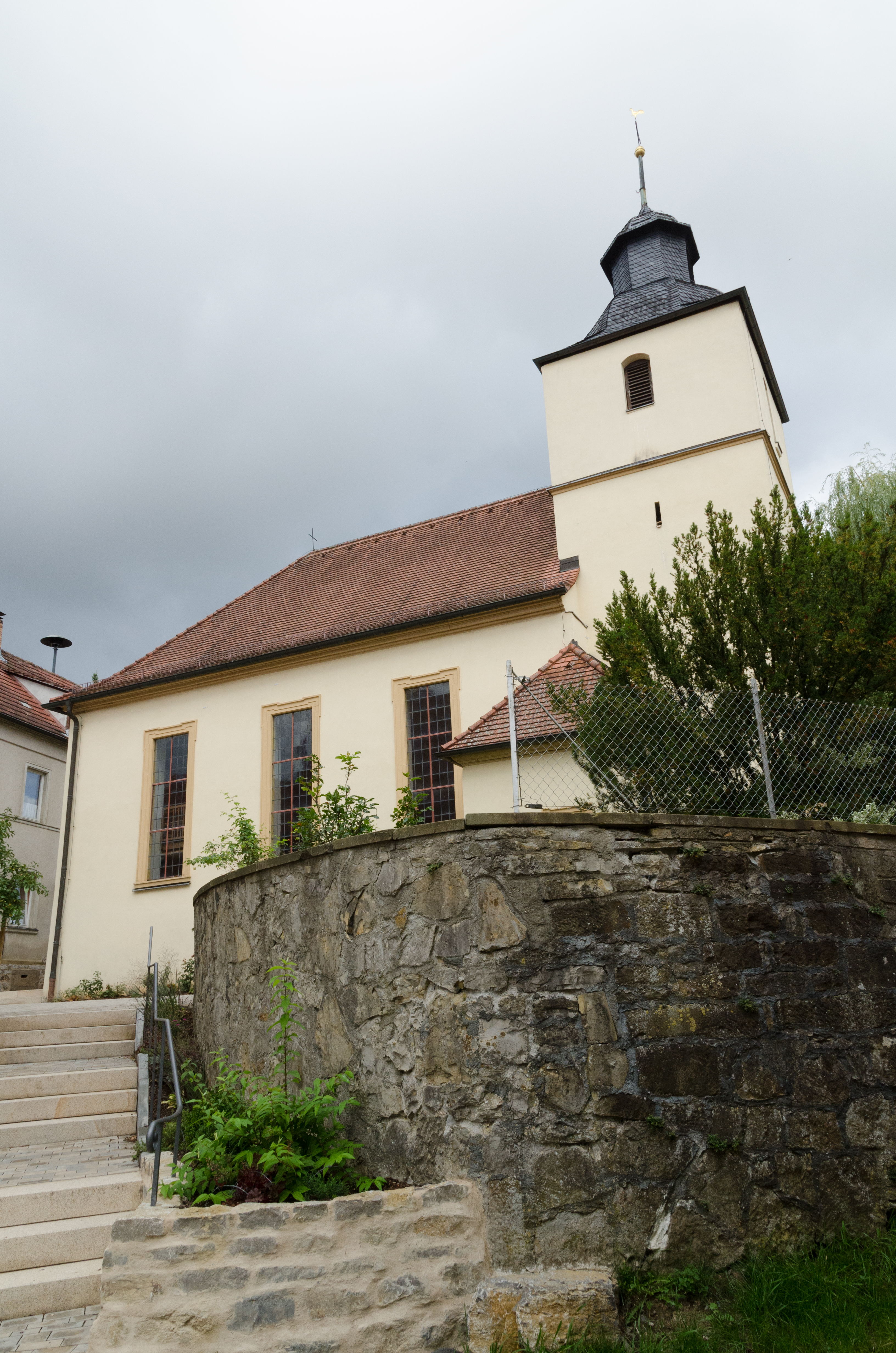 Zell, Pfarrkirche. Sep. 2013